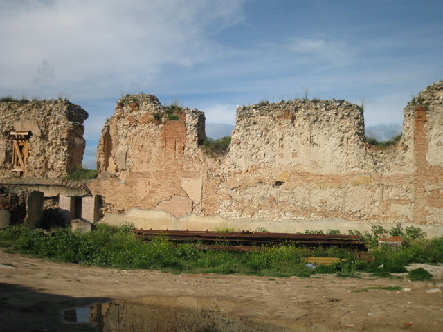 Alcázar de Guadalajara en España.